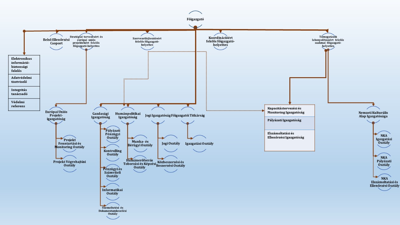 EMET szervezeti ábra